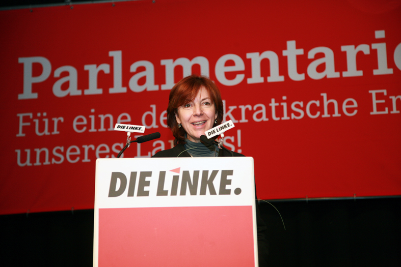 Kerstin Kaiser, Fraktionsvorsitzende der Linden im Landtag Brandenburgs, schildert Diskussionsergebnisse eines Workshops. Parlamentariertag der LINKEN in Kiel Abgeordnete aus Fraktionen von Landtagen und dem Bundestag treffen sich im Rahmen der Fraktionsvorsitzendenkonferenz der Linken in Kiel